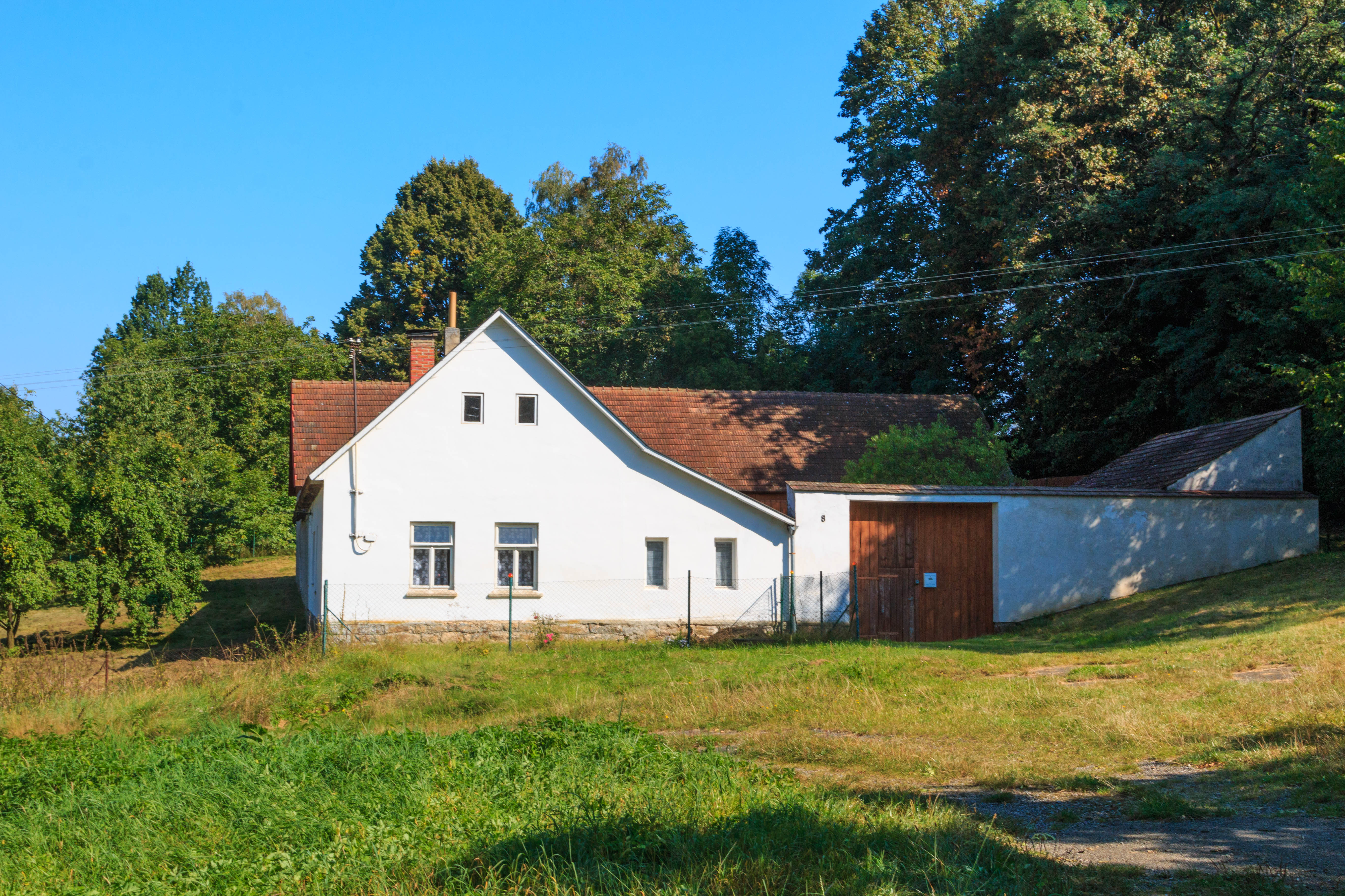 Lohenice u Koberovic - čp. 8